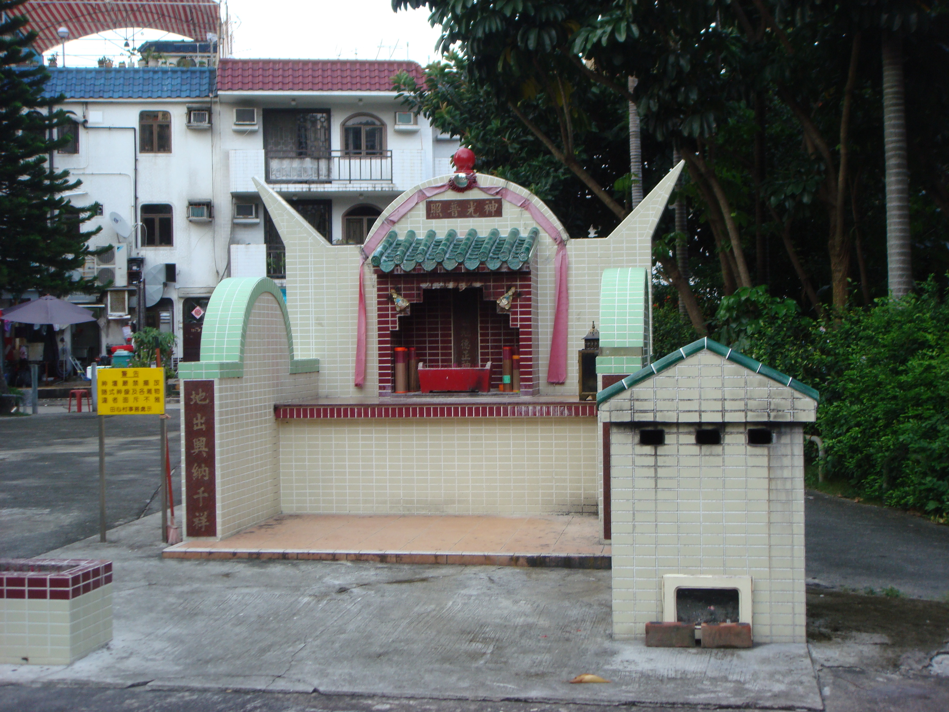 Tin Sam Village, Hong Kong